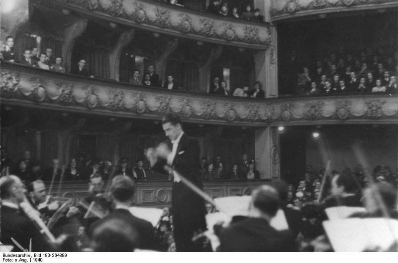 Herbert von Karajan Herbert von Karajan dirigiert in Madrid Abgebildete Personen: Karajan, Herbert von: Dirigent, Generalmusikdirektor der Wiener Staatsoper, Österreich